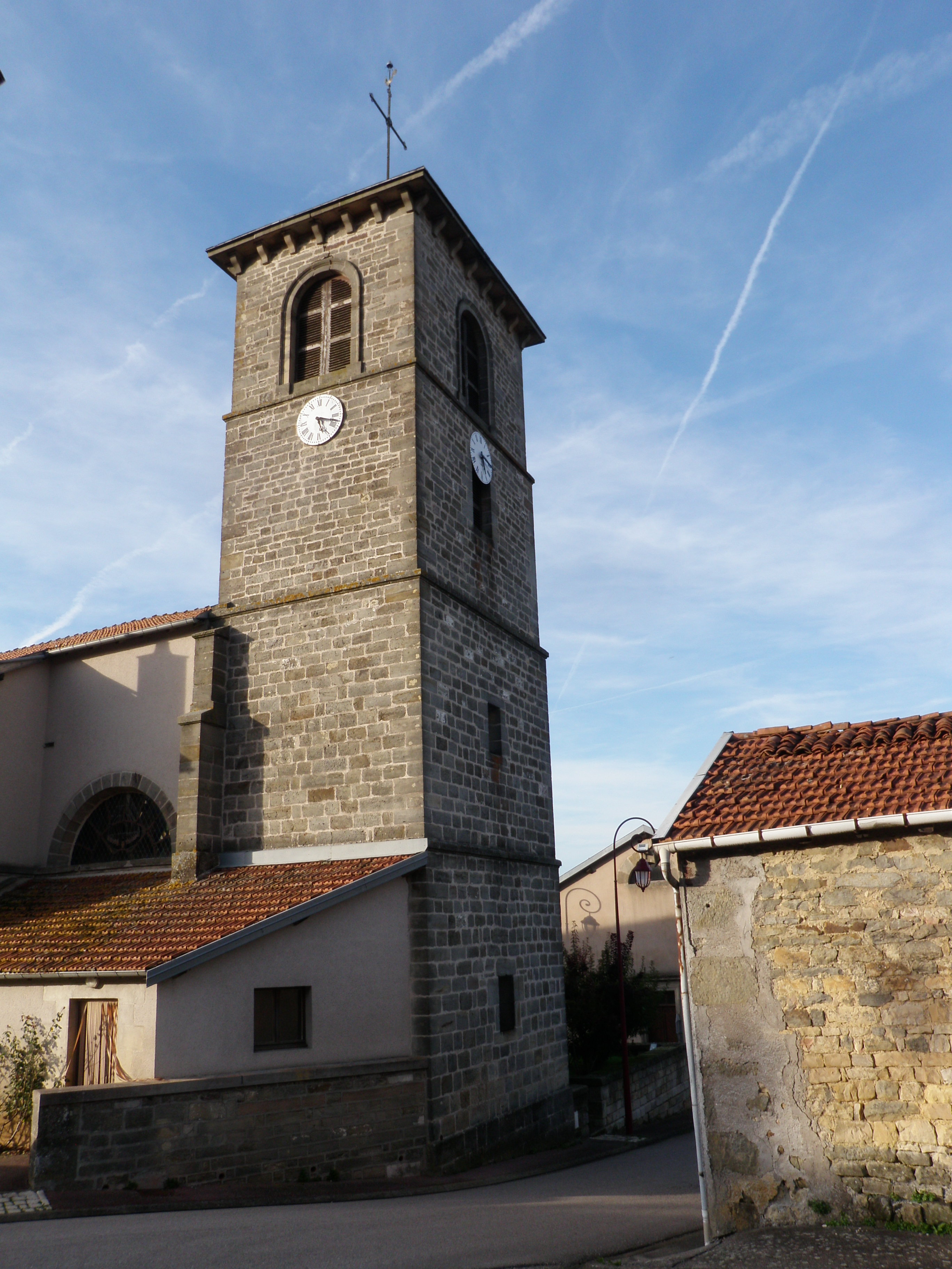 Clocher de l'Eglise Saint-Didier